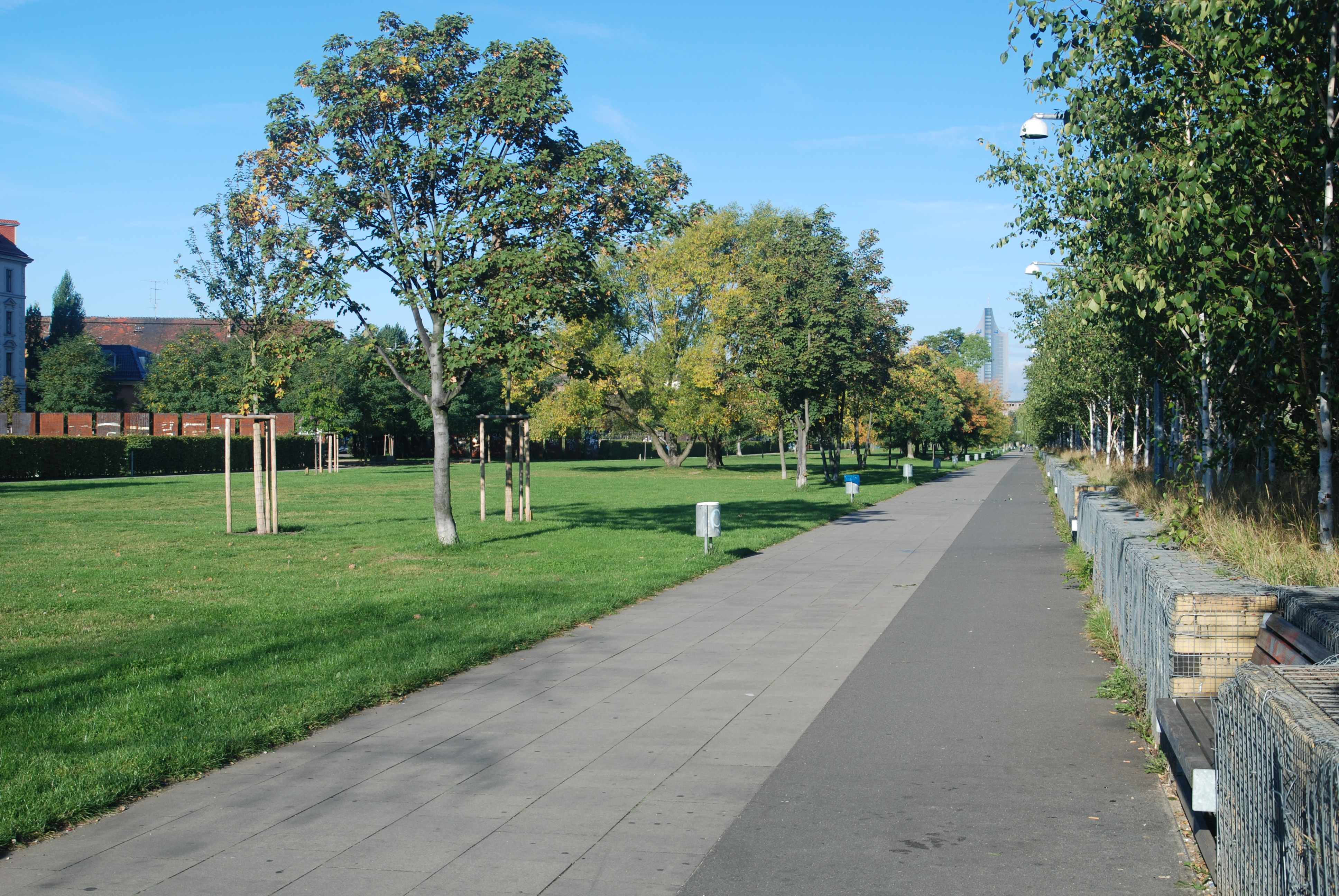 Lene-Voigt-Park in Leipzig